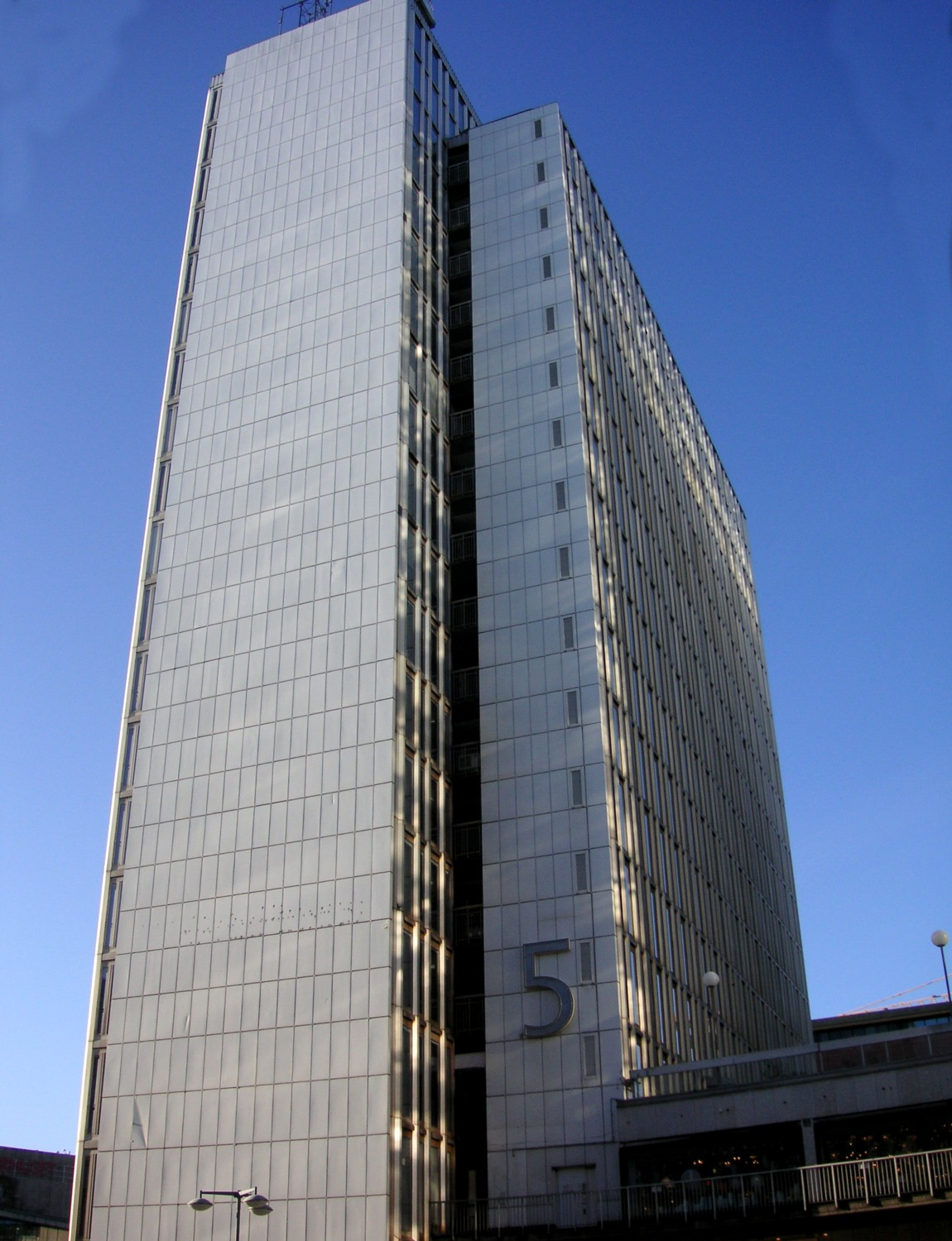 Cityhöghusen i Stockholm, hus 5